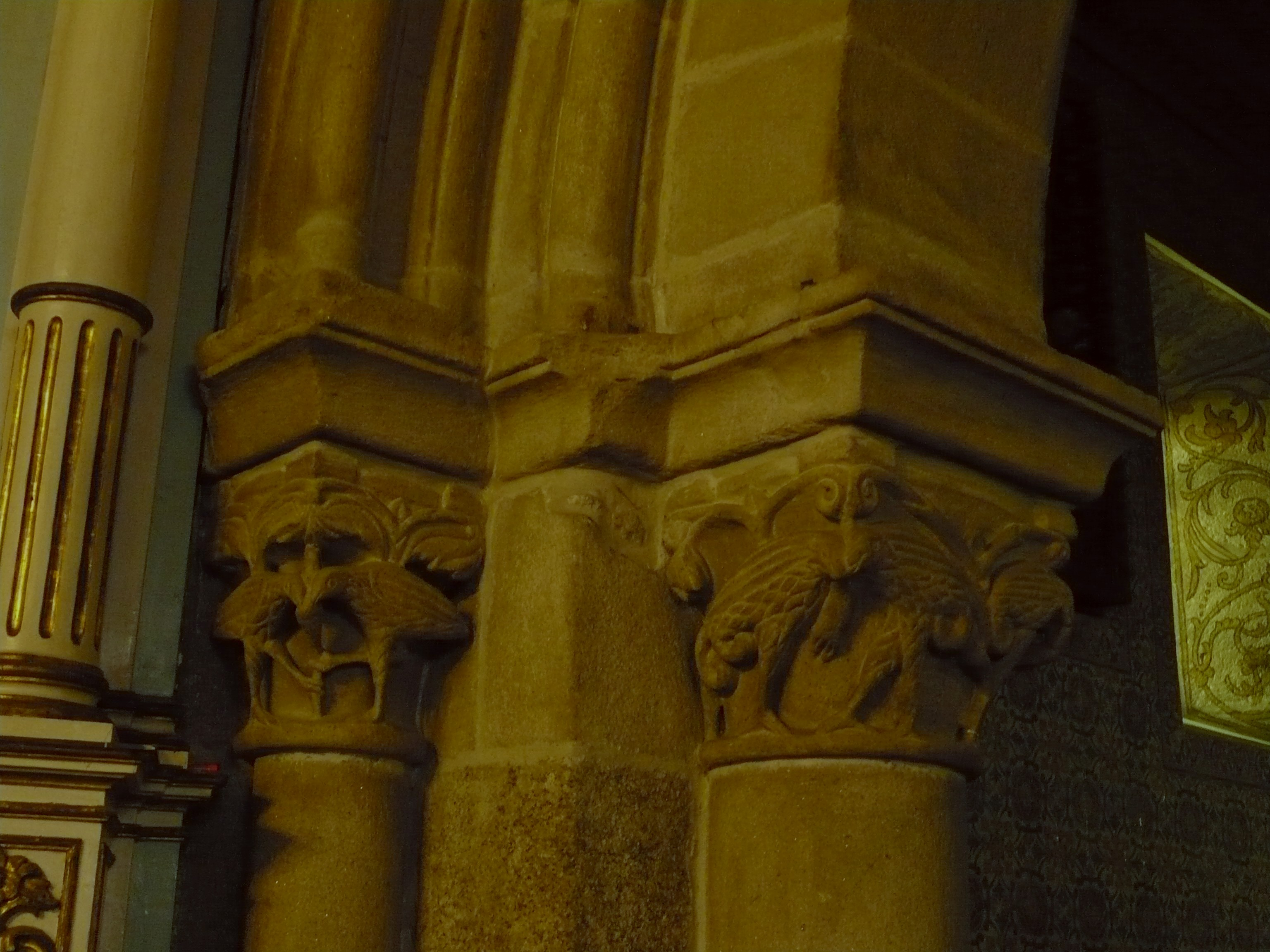 Pormenor do arco triunfal da Igreja de Santiago de Antas, Famaicão, Portugal